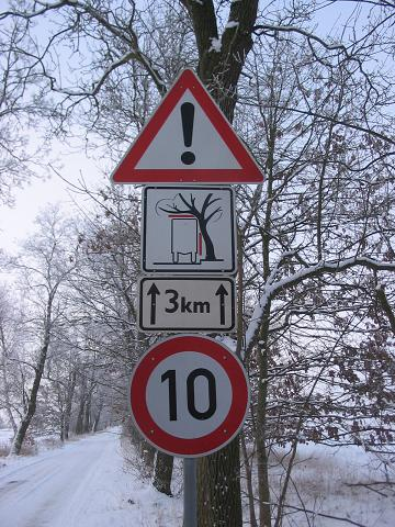 Verkehrsschilder: Warnung vor eingeschränktem Lichtraumprofil sowie Tempolimit 10 km/h Naturpark Nuthe-Nieplitz, Brandenburg. Straße Tremsdorf – Gröben